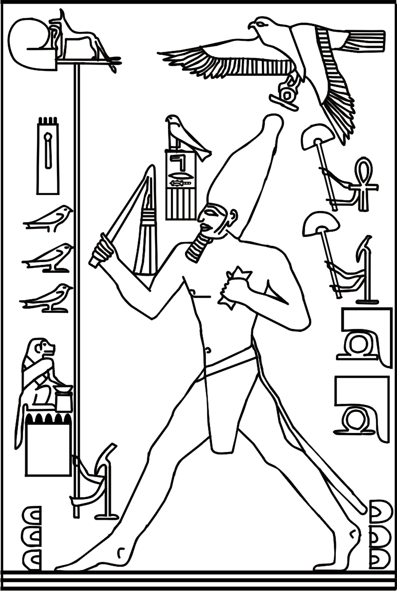 König Djoser (3. Dynastie) beim Hebsed-Lauf (Relief aus den unterirdischen Grabgalerien) / Pharaoh Djoser (3rd dynasty) during the hebsed run (relief from the subterannean galeries)